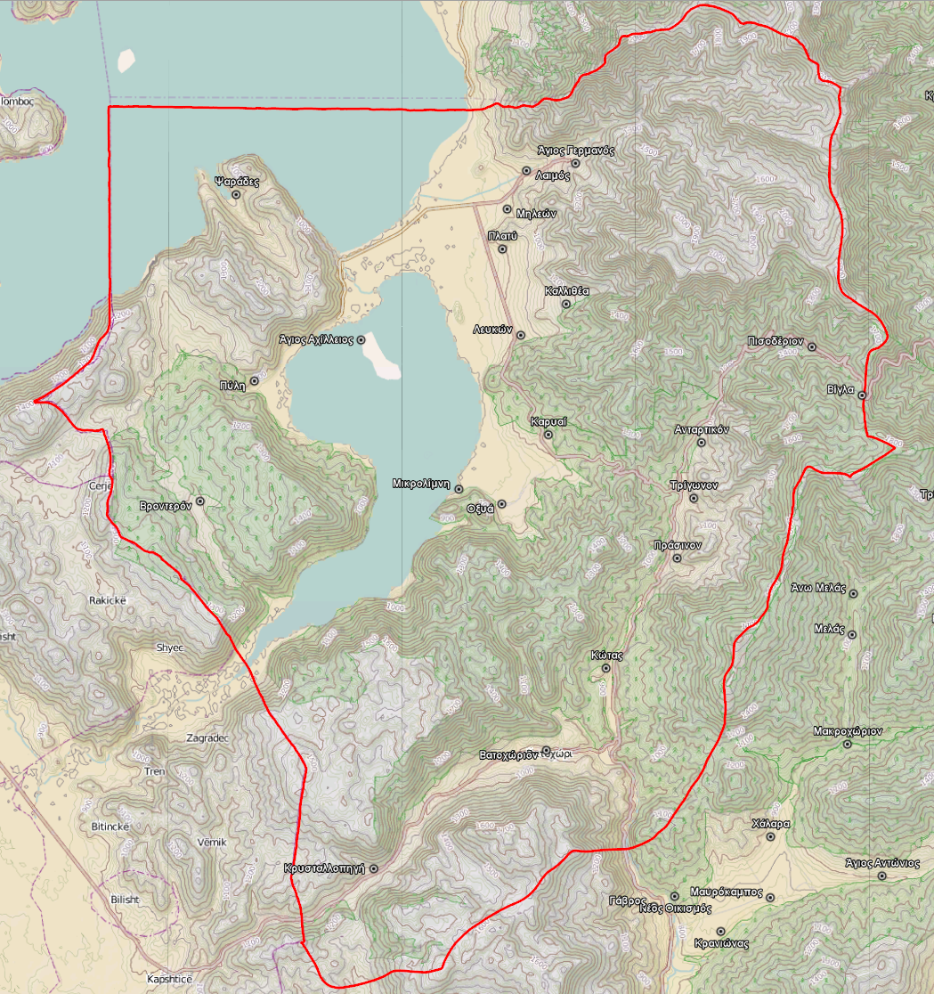 Τοπογραφικός χάρτης του Δήμου Πρεσπών